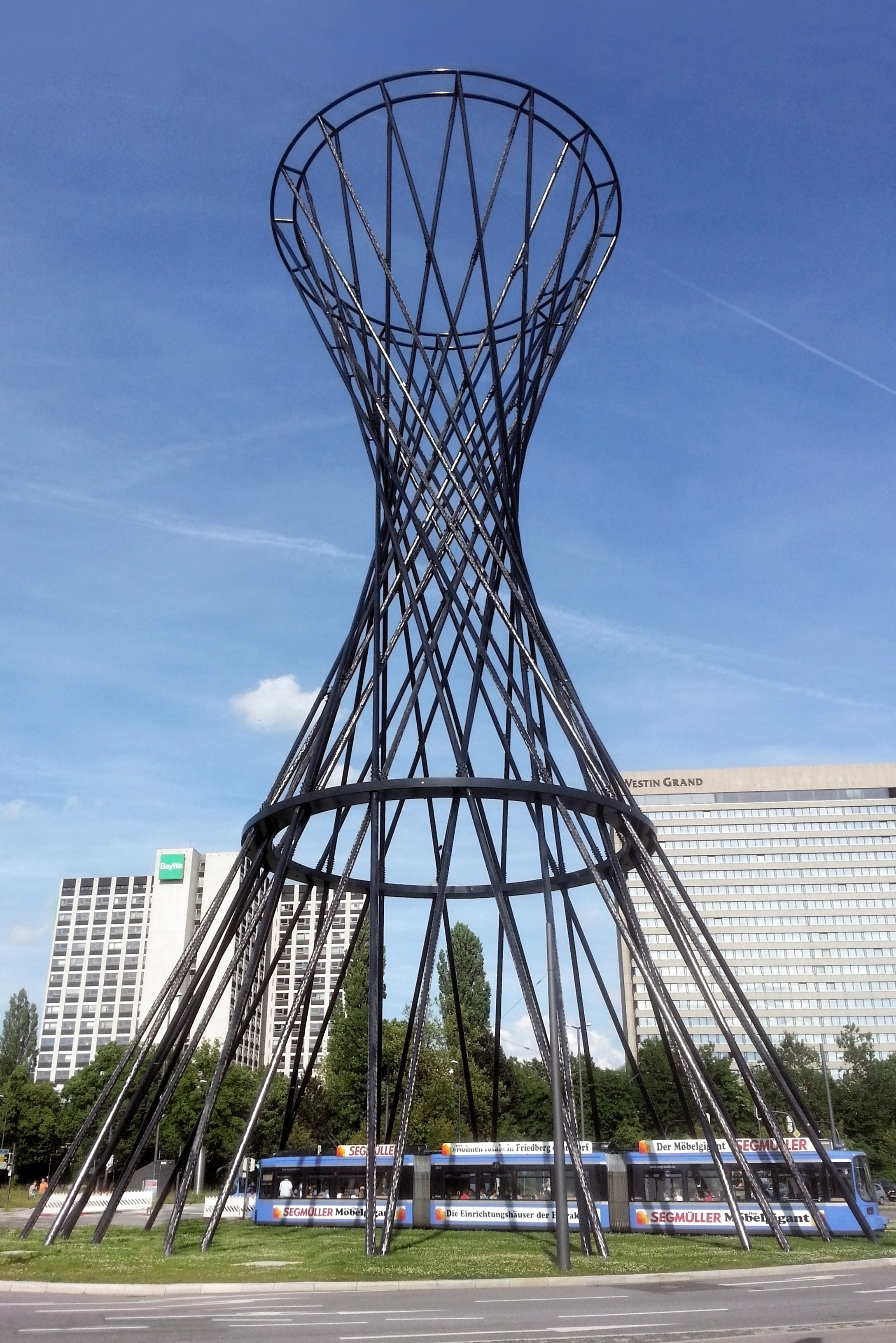 Tram 16 durchquert die Mae West